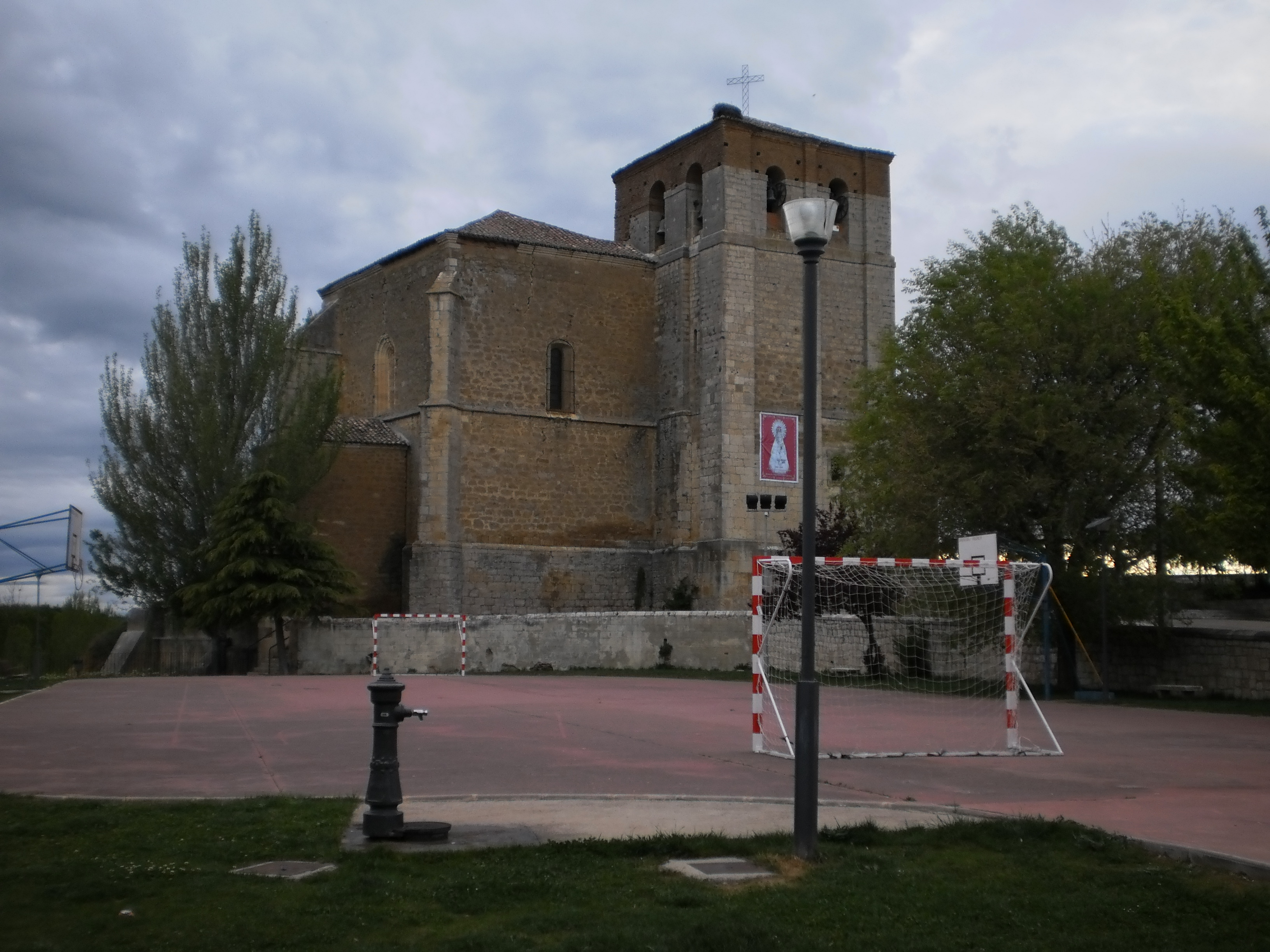 Ermita de Nuestra Señora de Belén